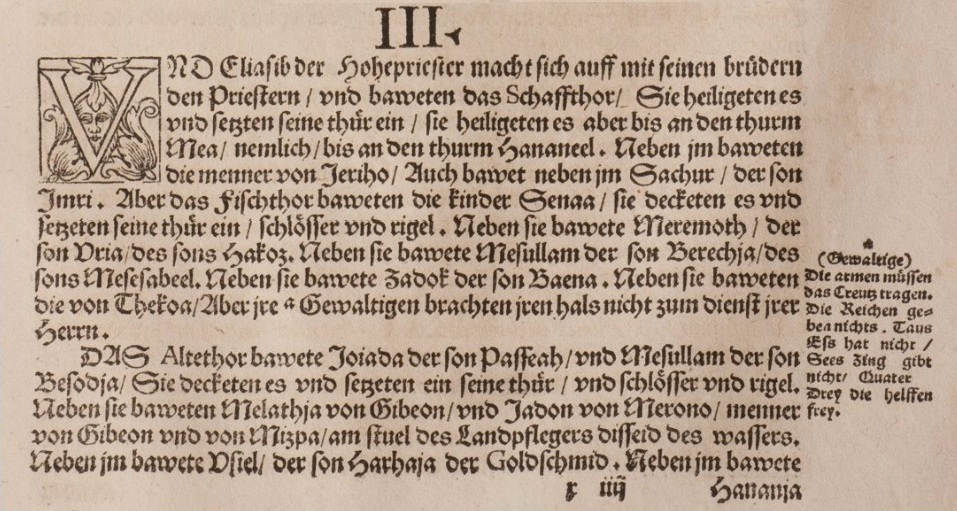 Martin Luther, Randglosse zu Nehemia 3,5 mit Bezug auf die Augenzahl beim Würfelspiel